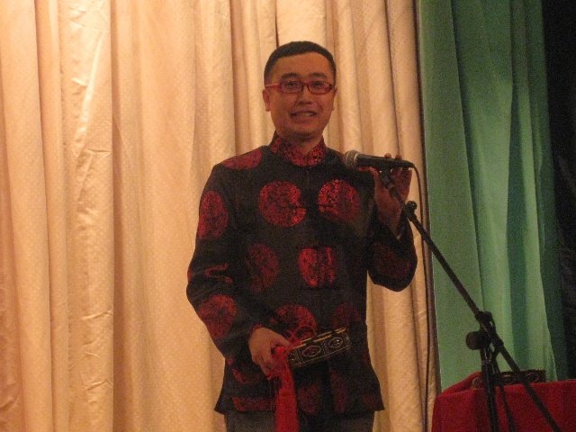 满族八角鼓艺人许克演出照